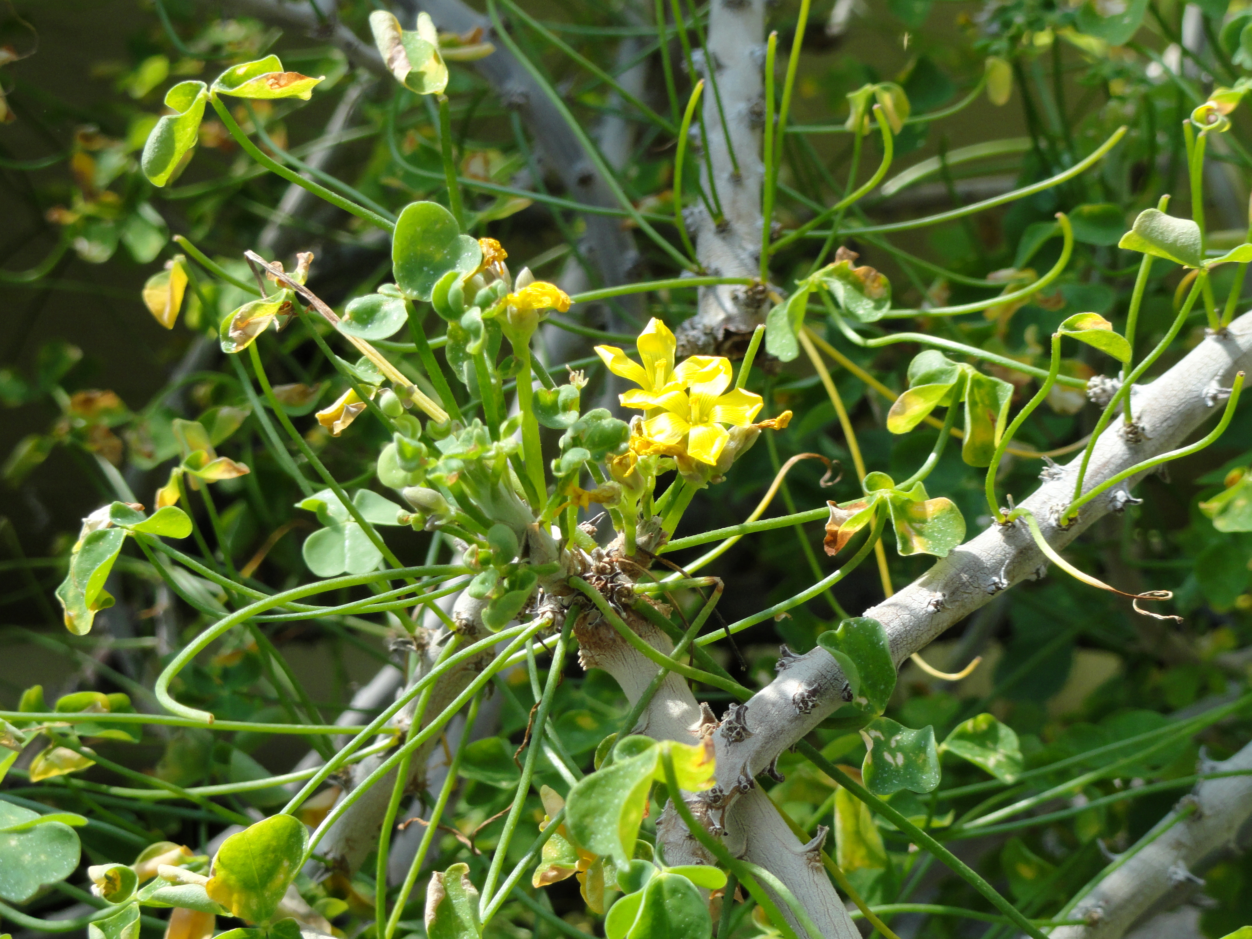 Oxalis gigantea specimen in the Botanischer Garten München-Nymphenburg, Munich, Germany.